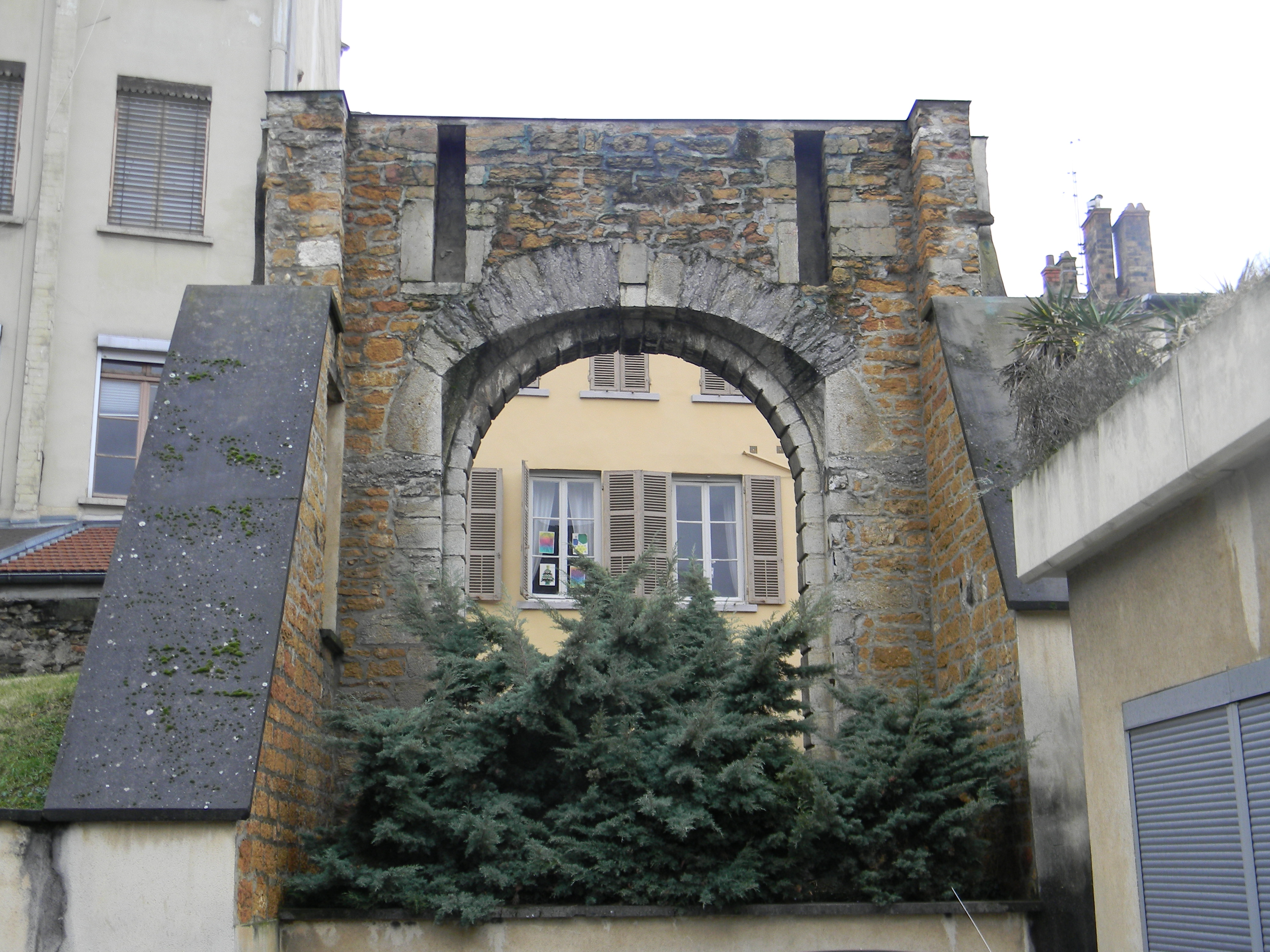 L'ancienne porte de la Croix-Rousse, qui était placée dans la muraille Saint-Sébastien et permettait l'accès à la ville depuis l'extérieur.